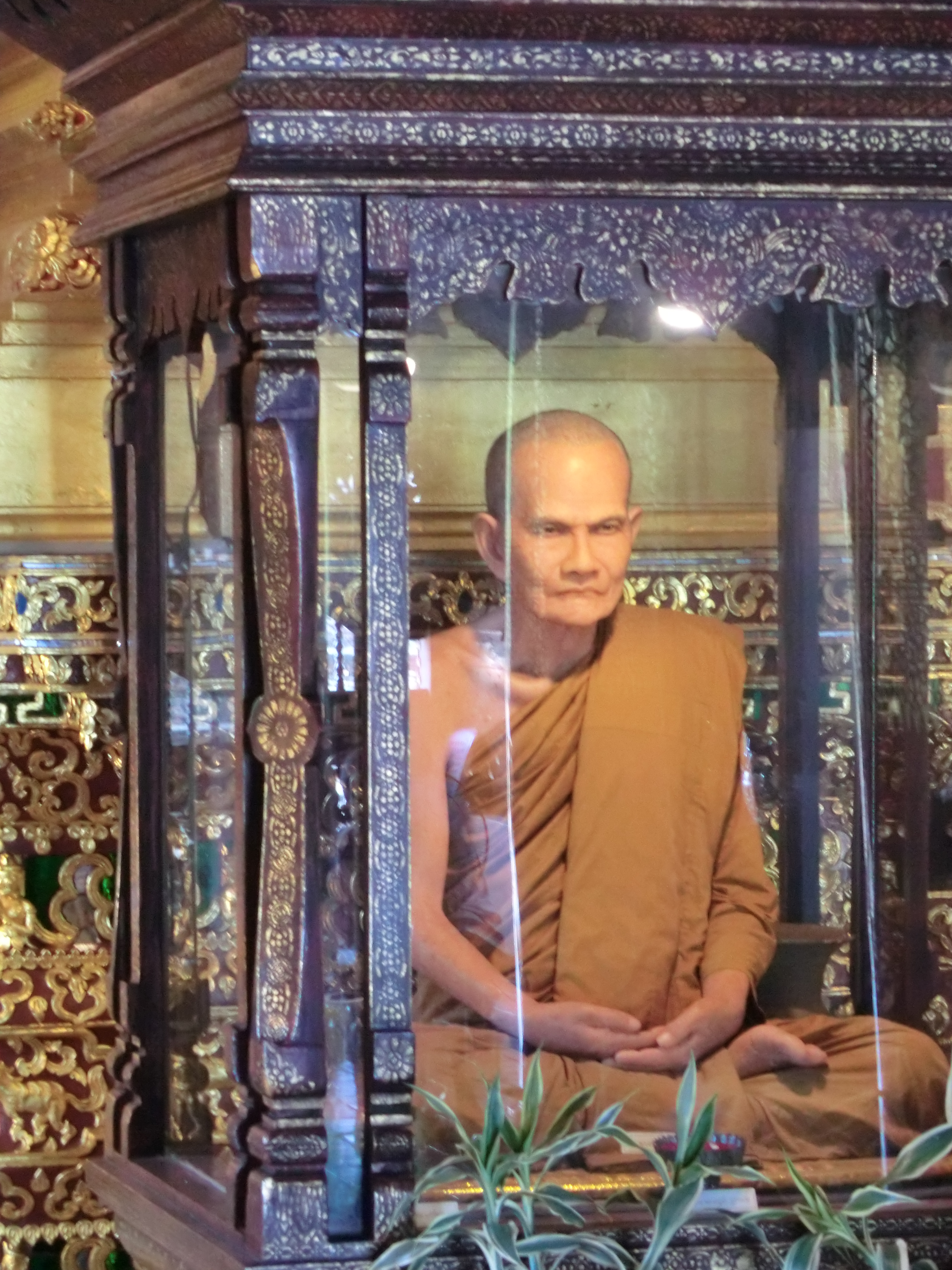 Si Phum, Mueang Chiang Mai District, Chiang Mai, Thailand